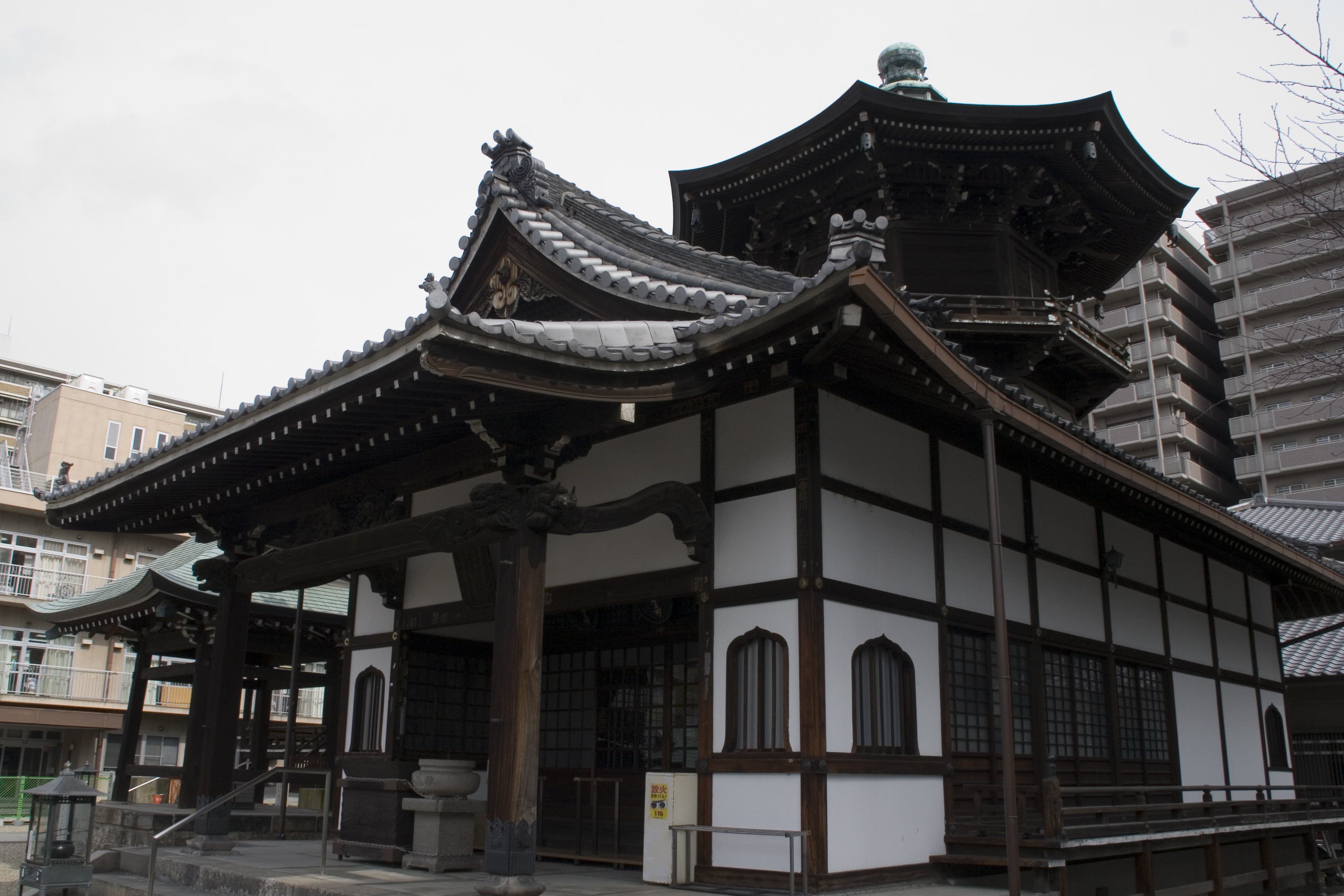 鶴満寺 (大阪市) 観音堂